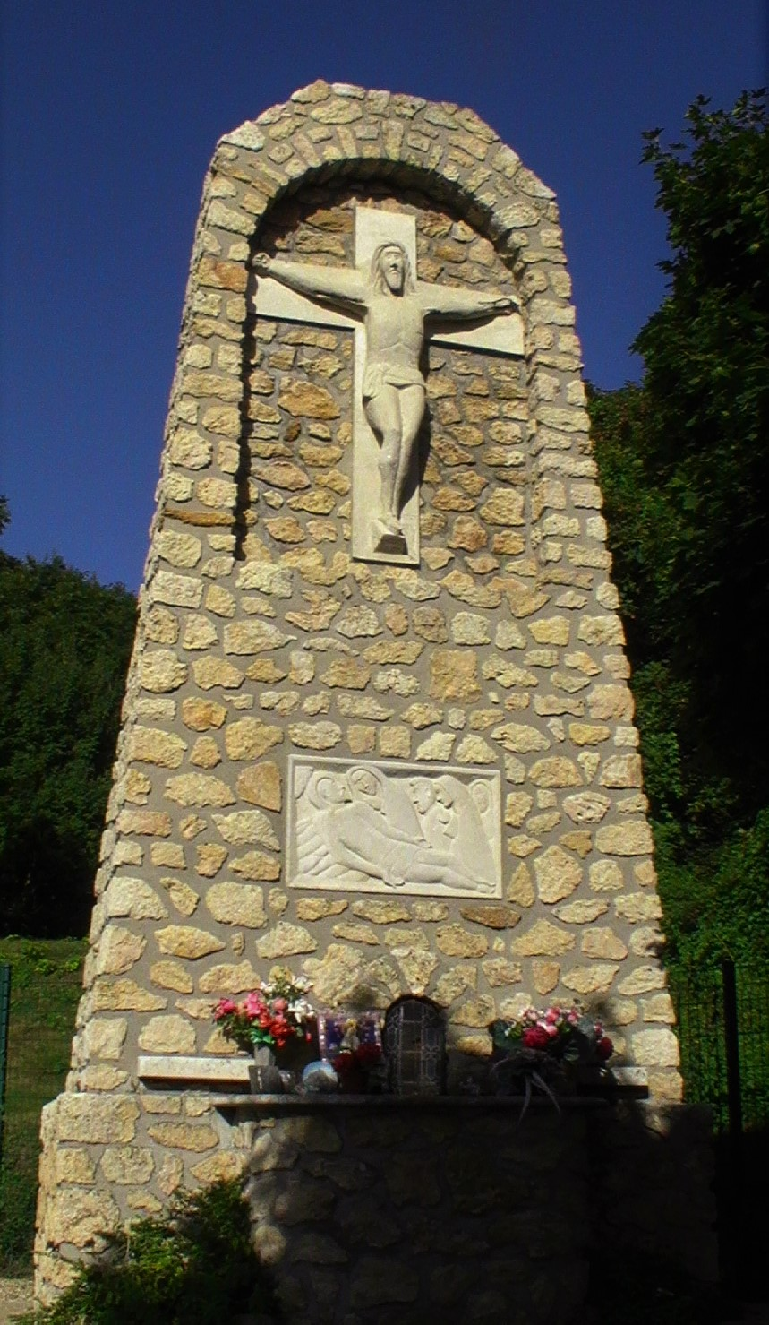 Calvaire du cimetière nouveau d'Aubevoye - Eure - 1953 - Une plaque sur le côté droit de l'autel porte la mention Fait et offert par M. et Mme Villain - 1956.